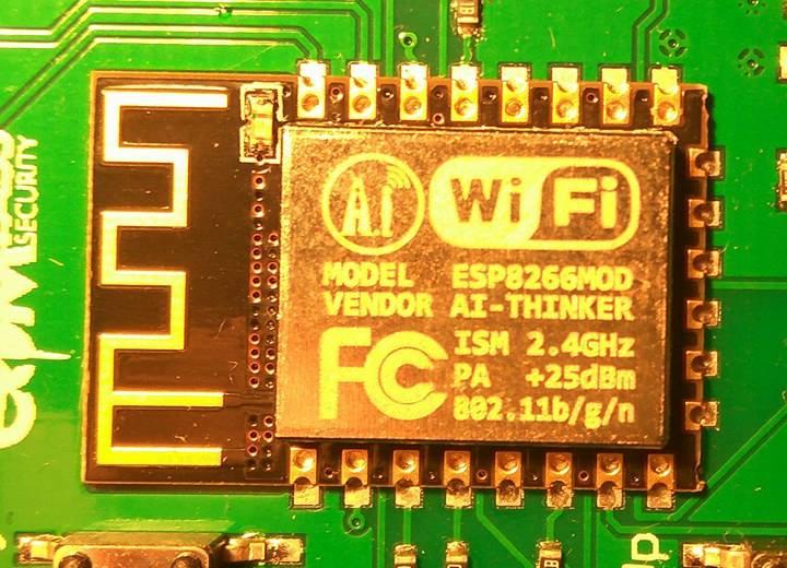 Pildil on AI-Thinkeri ESP-12 moodul, mis sisaldab endas ESP8266 kiipi.